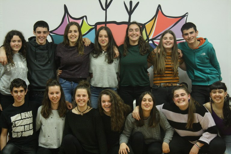 2019ko finala. (Iturria: Euskal Herriko Bertsozale Elkartea)